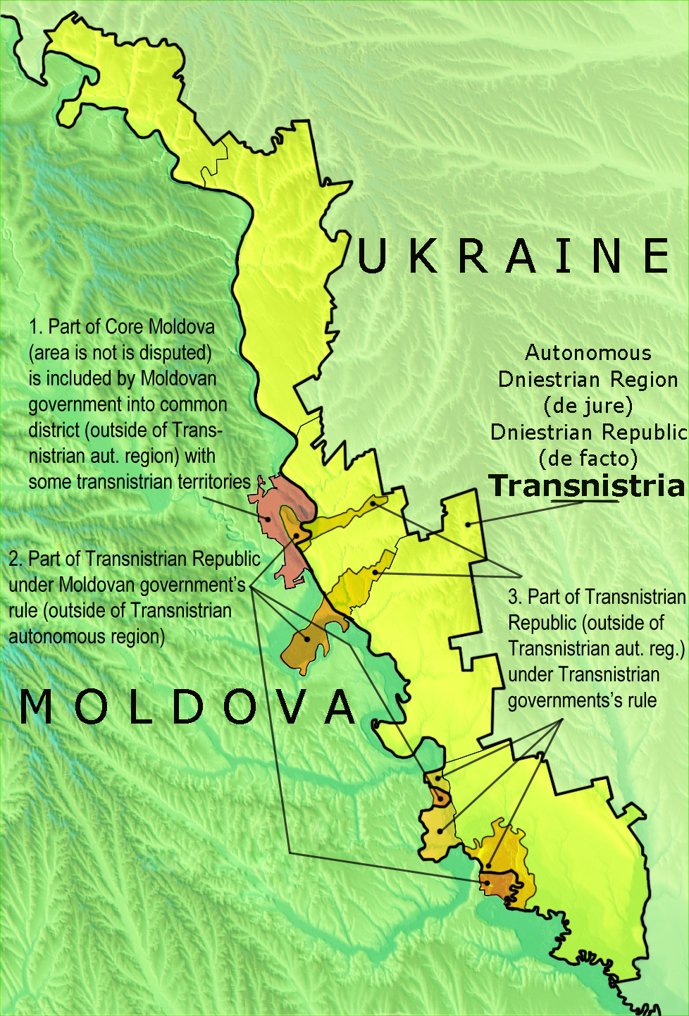 Transnistria politică, hartă derivată după Asybaris